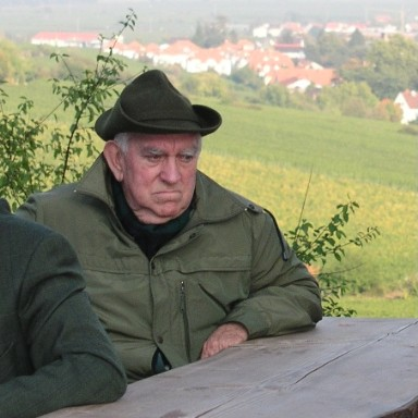 Der Pfälzer Mundartdichter Paul Tremmel, aufgenommen bei der Prominentenweinlese im Deidesheimer Paradiesgarten